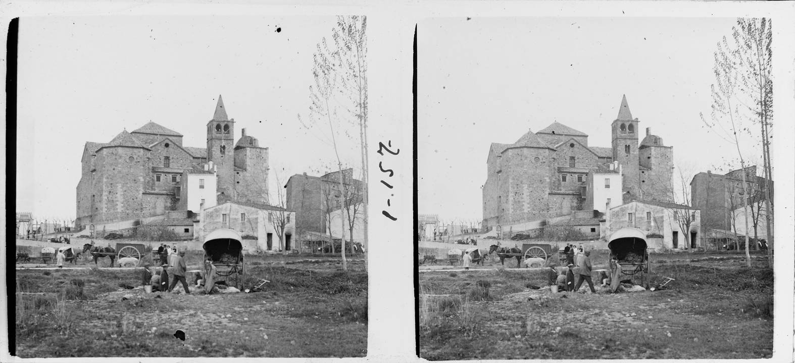 Església de Tordera. Josep Salvany i Blanch (1914)